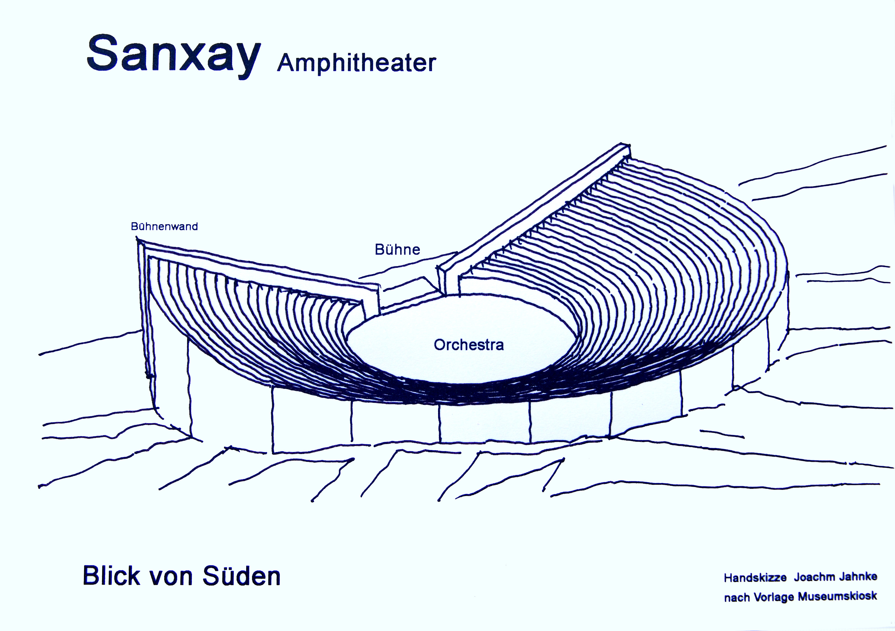 Sanxay, Amphitheater, Block von Süden